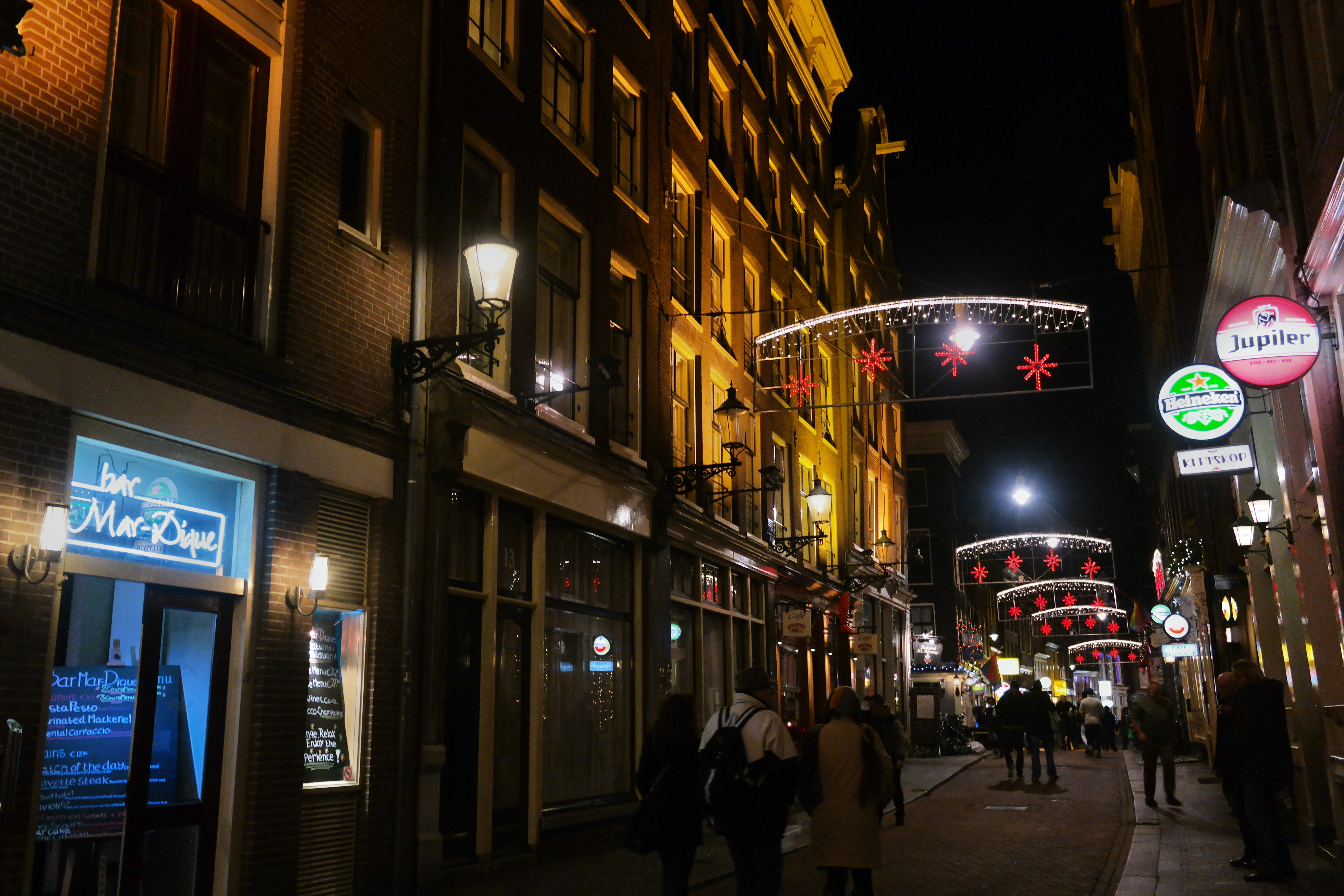 Zeedijk in Amsterdam at night, 2014.